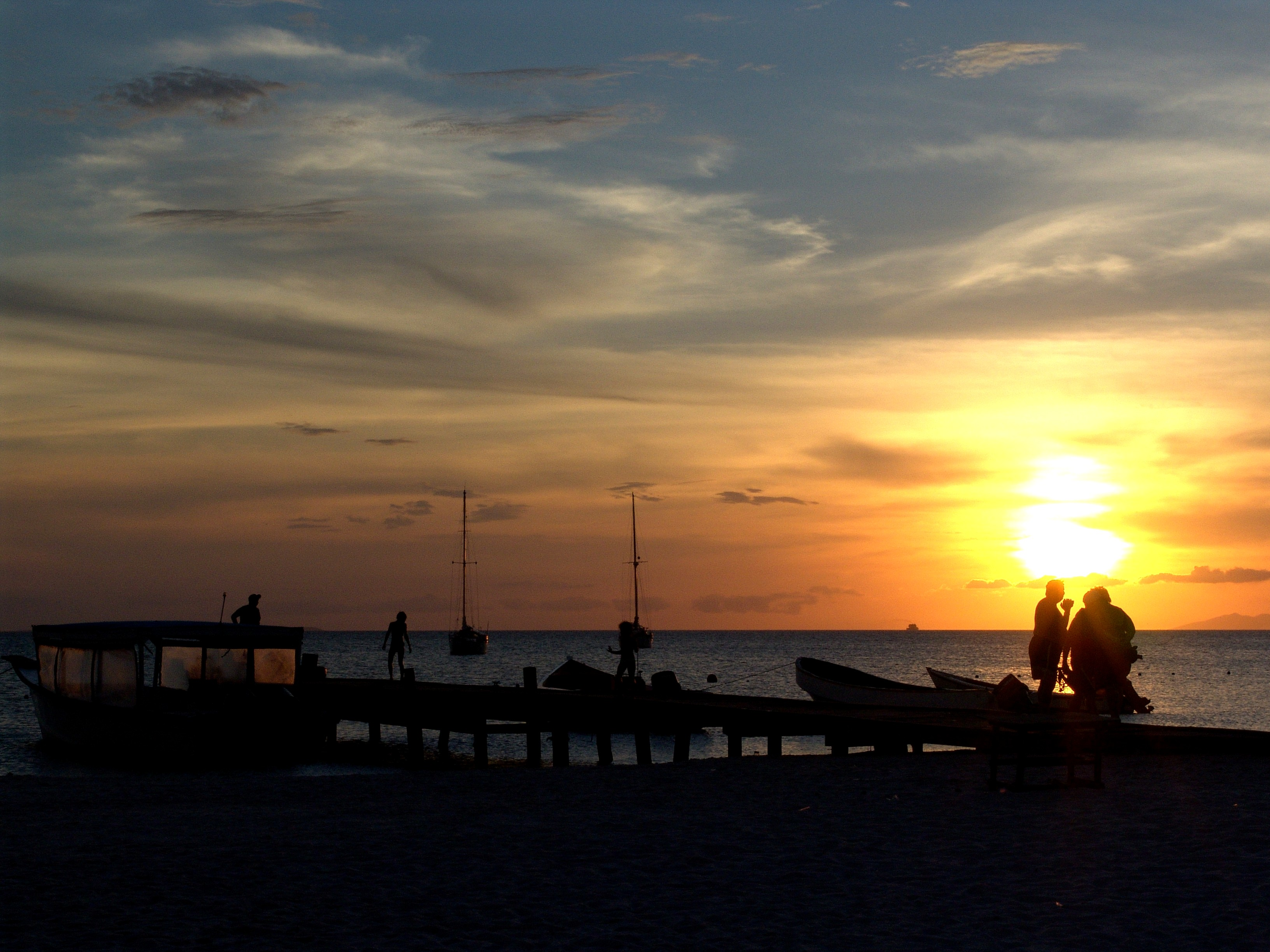 Atardecer en la Isla de Coche